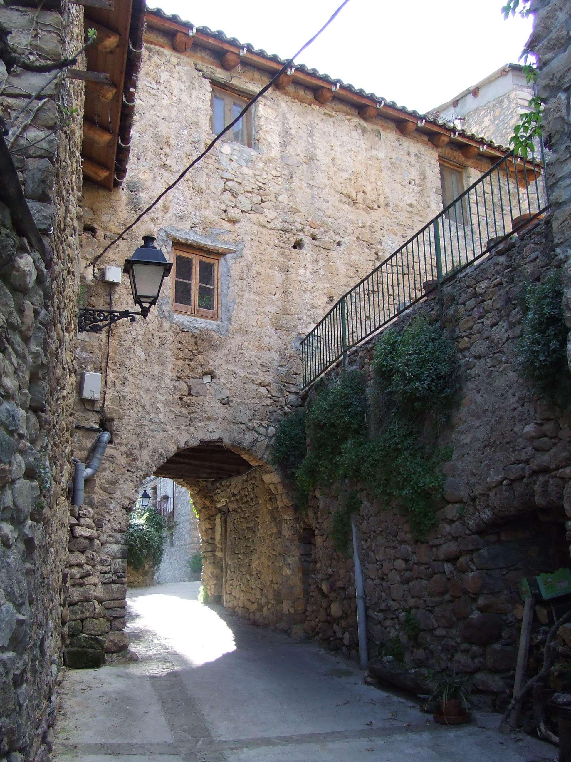 Portal de ran d'església. Rivert (Toralla i Serradell, Conca de Dalt, Pallars Jussà)